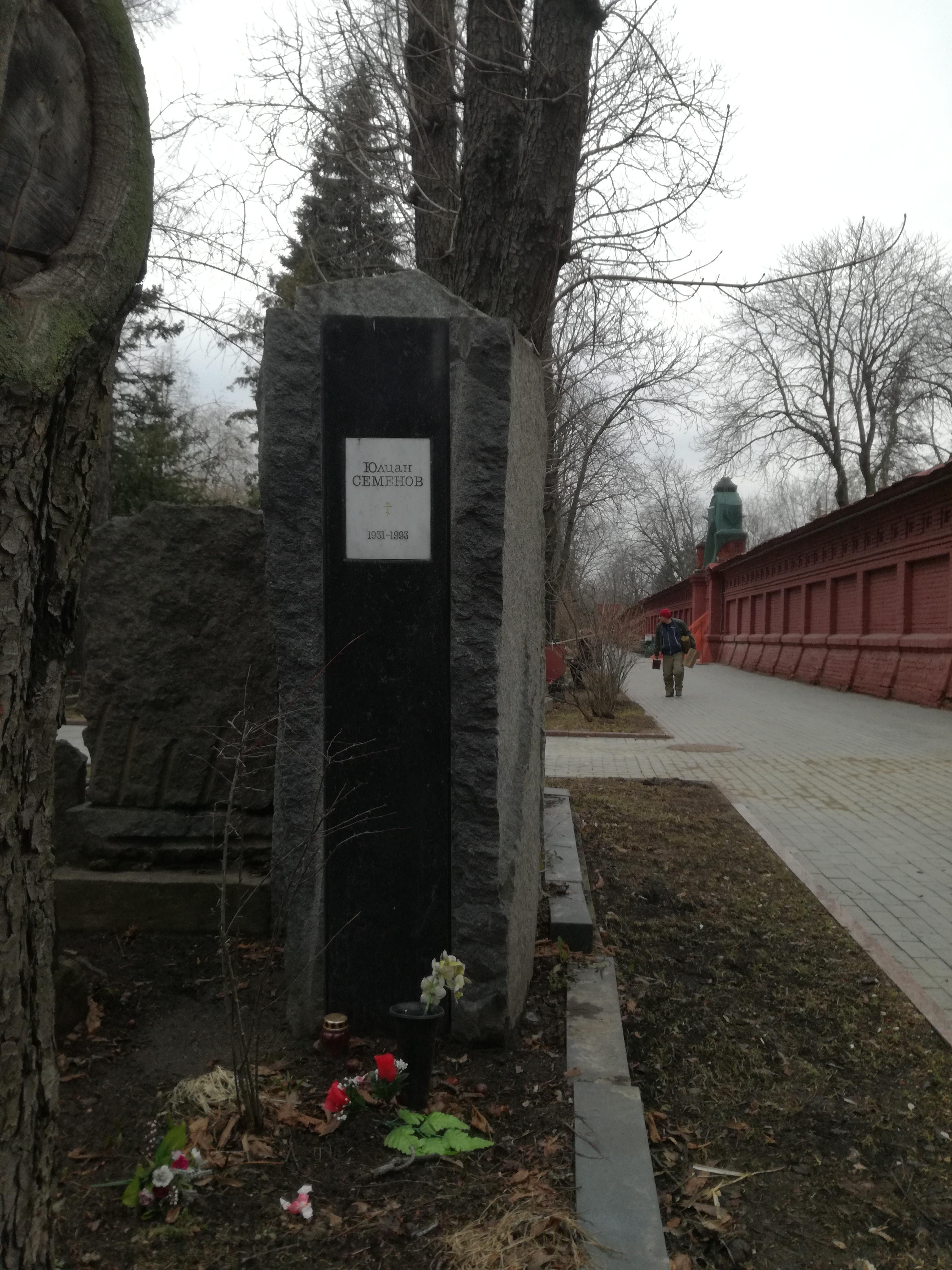 Новодевичье кладбище